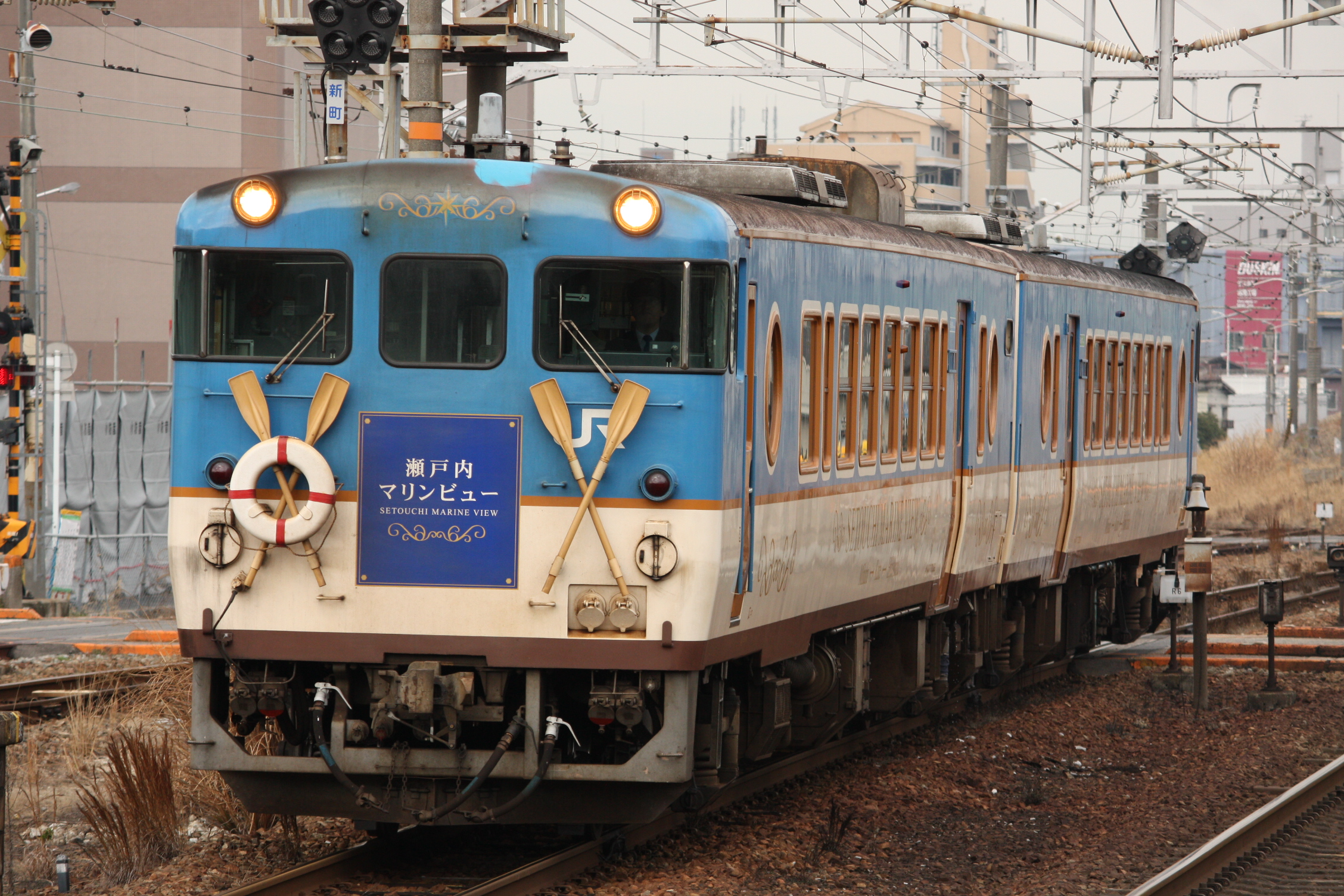 海田市に入線するキハ47「瀬戸内マリンビュー」